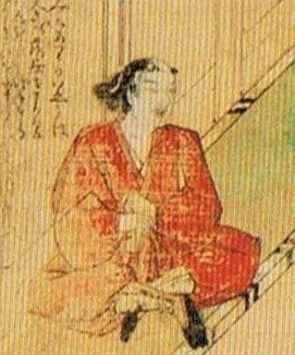 『蒙古襲来絵詞』後巻【絵十一】に描かれた河野通有。